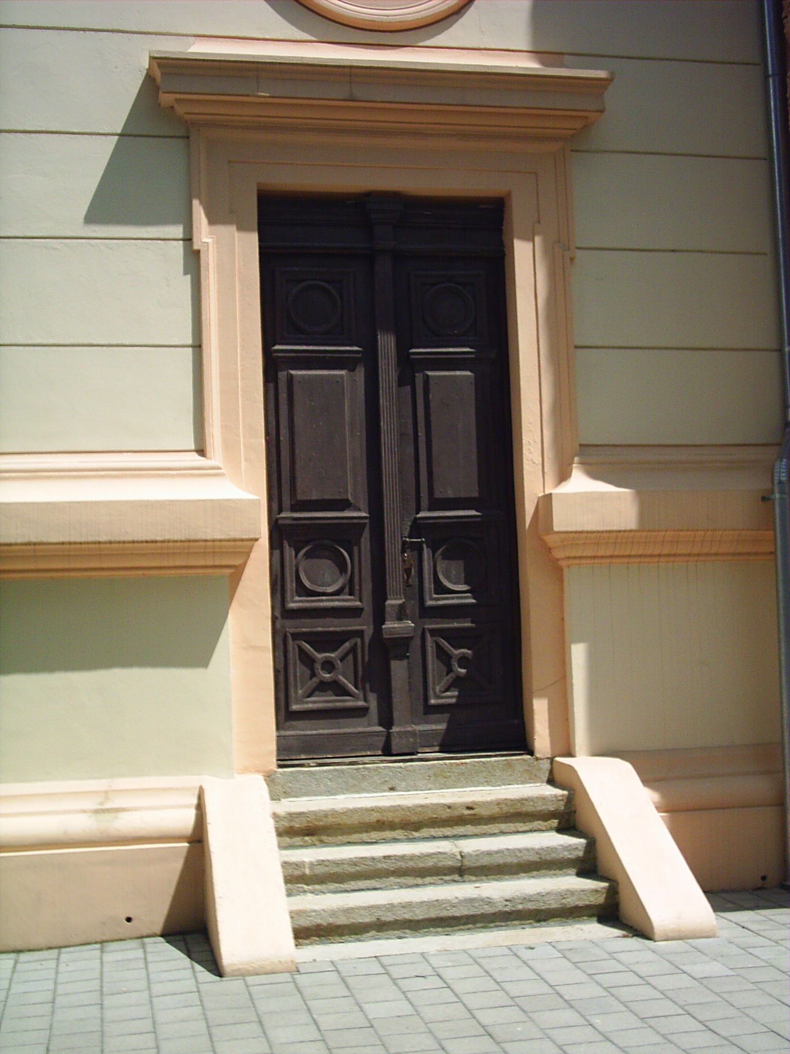 Ajtó, sekrestyébe, Kiskunfélegyháza, Szt István templom